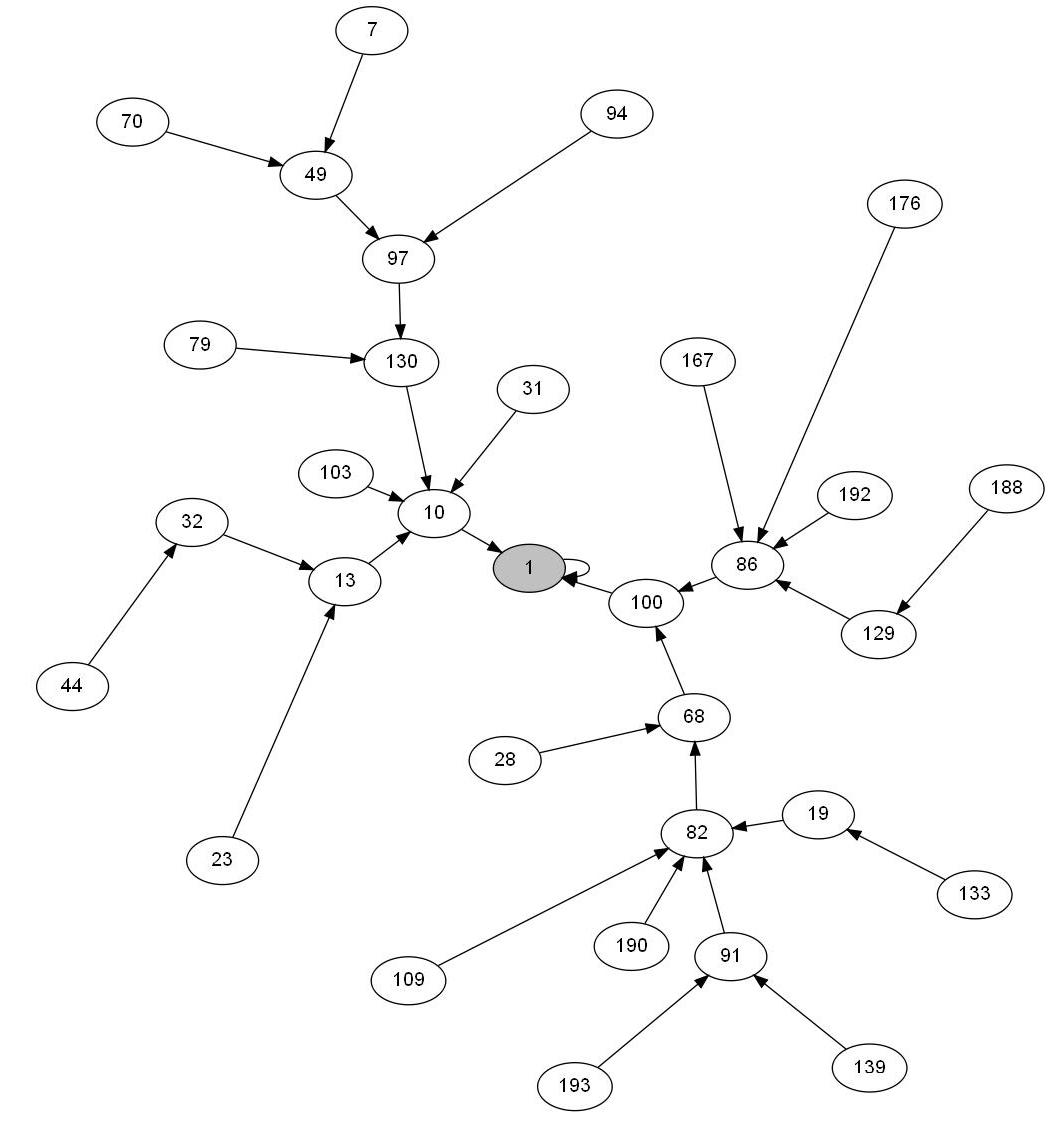 A 200-nál kisebb boldog számok gráffal ábrázolva. A gráf csomópontjai a számok, élei a transzformáció (számjegyek négyzetösszege) eredményét jelölik